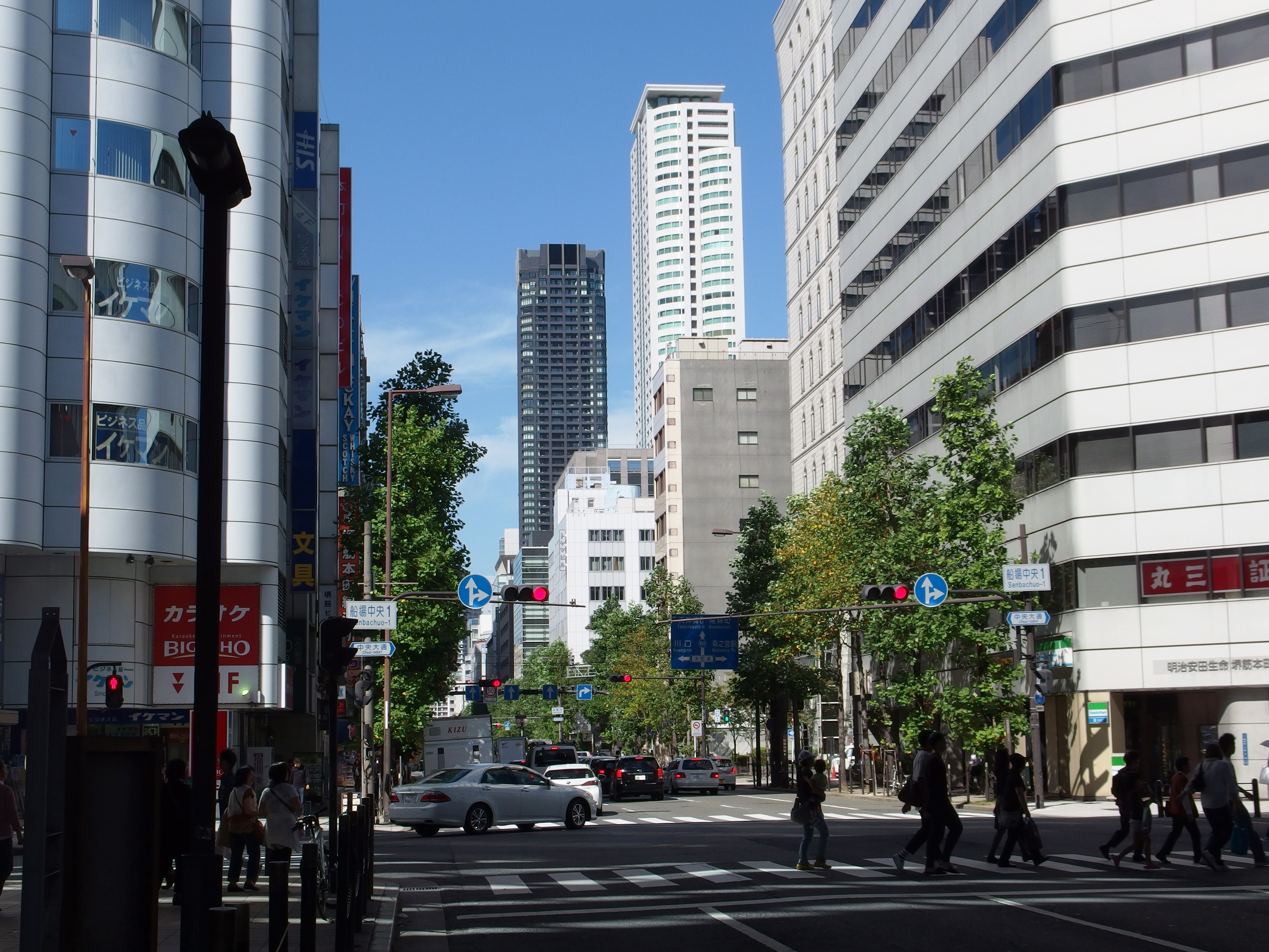 堺筋, 船場中央1交差点, 大阪府, 大阪市